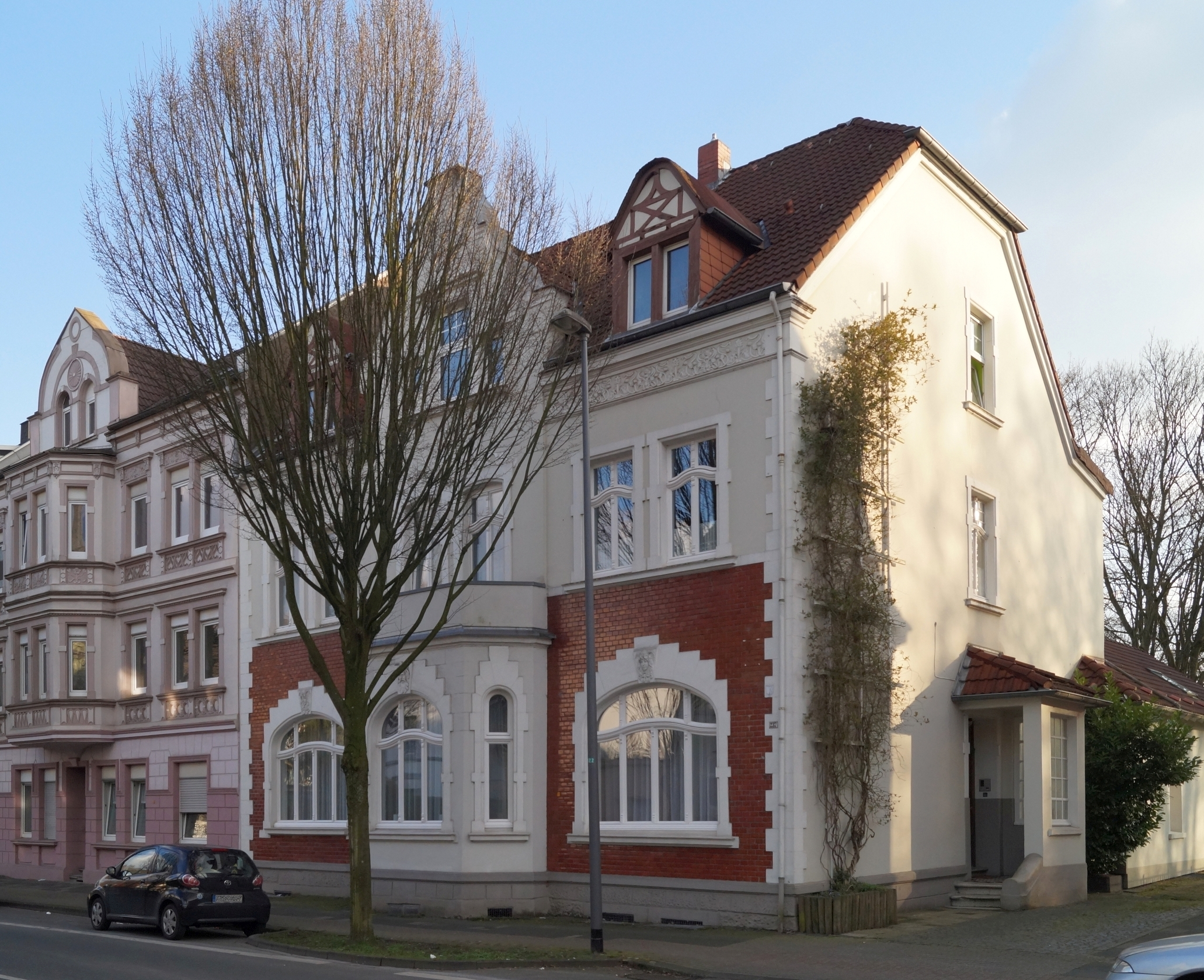 Wohngebäude in Herne-Röhlinghausen, Baudenkmal